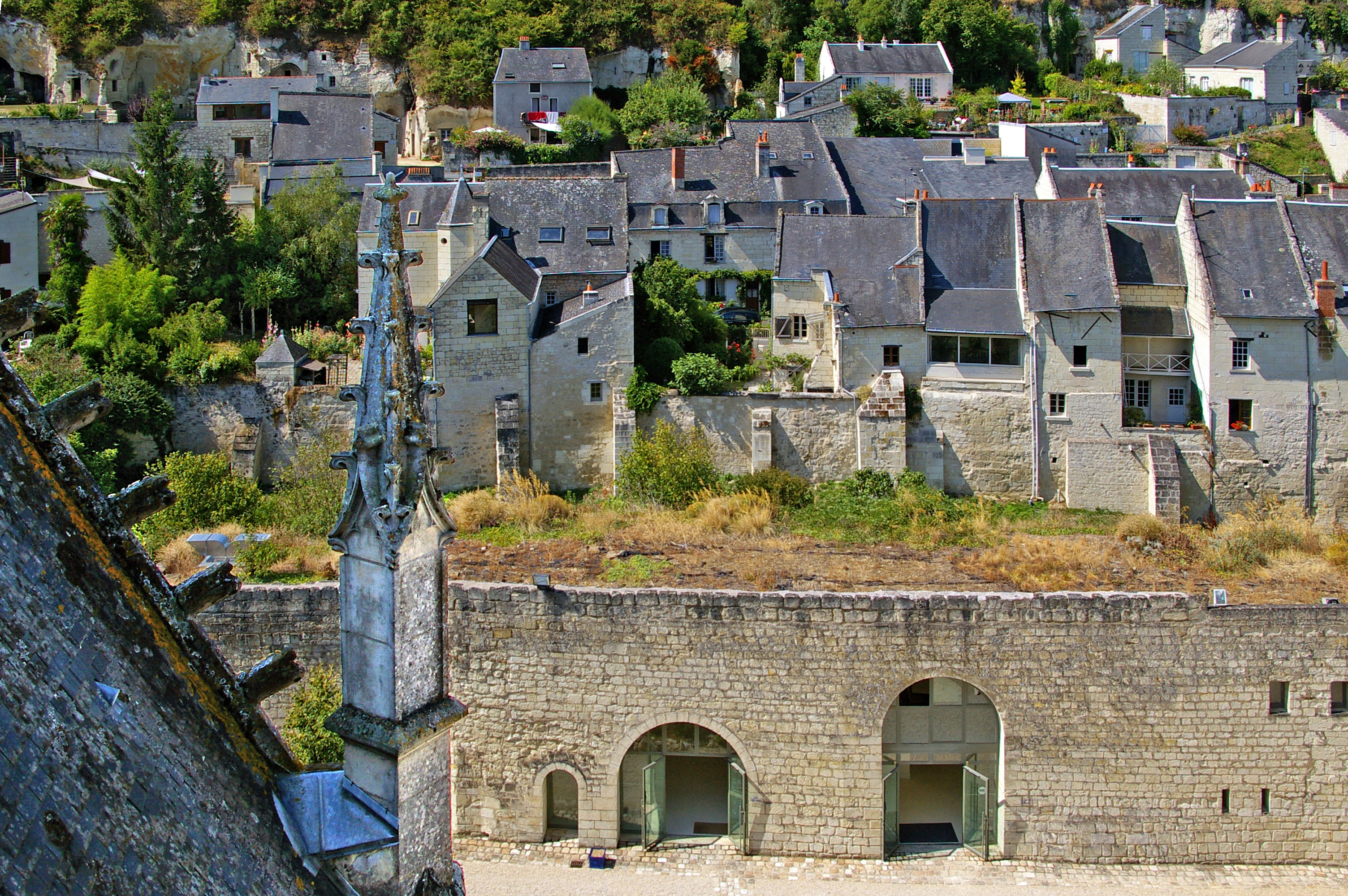 Château de Montsoreau, xvème siècle Alexandre Dumas a rendu célèbre le nom de Monsoreau dans son roman La Dame de Monsoreau ( sans "t"). L'histoire met en scène les amours de Diane de Méridor, épouse de Charles de Chambes, comte de Monsoreau, et de son amant Louis de Bussy d'Amboise. Montsoreau, fifteenth century Alexandre Dumas has made famous the name of Monsoreau in his novel La Dame de Monsoreau (without "t"). The story depicts the love of Diane de Meridor, wife of Charles de Chambes, Earl of Monsoreau, and her lover Louis de Bussy d'Amboise.